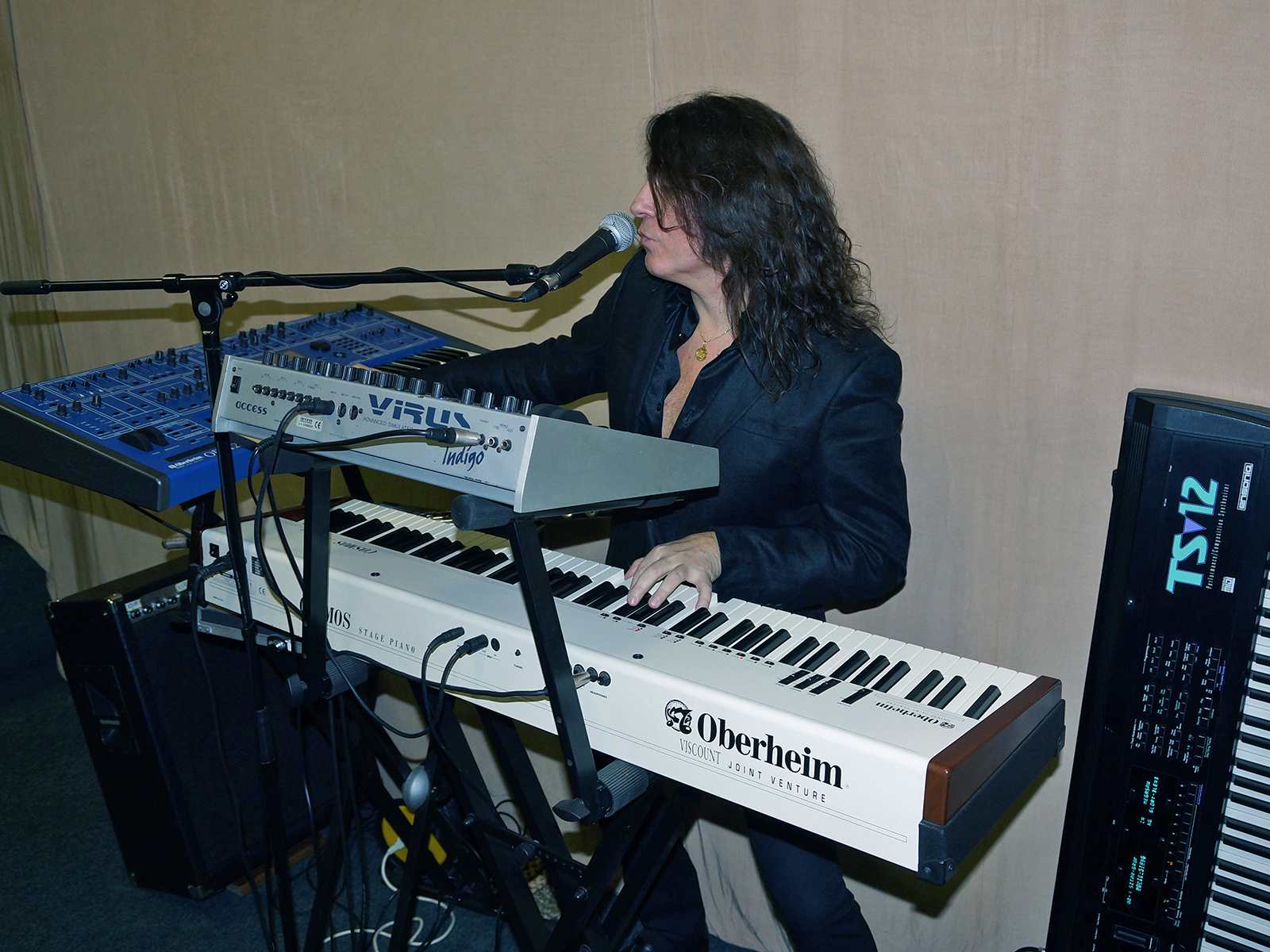 2017 год. Работа над новым альбомом.